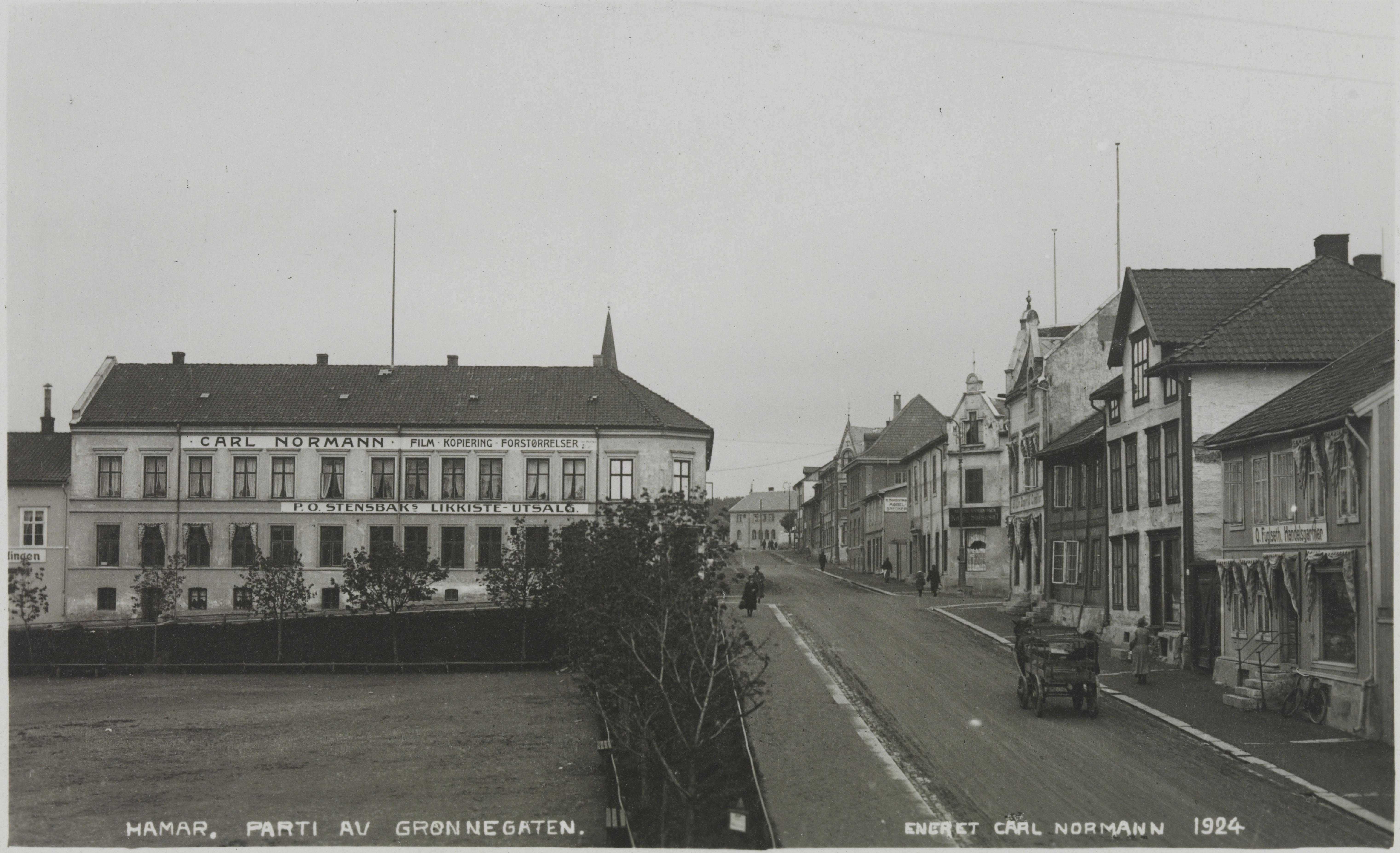 Bildet er hentet fra Nasjonalbibliotekets bildesamling Grønnegata, Hamar, Hedmark